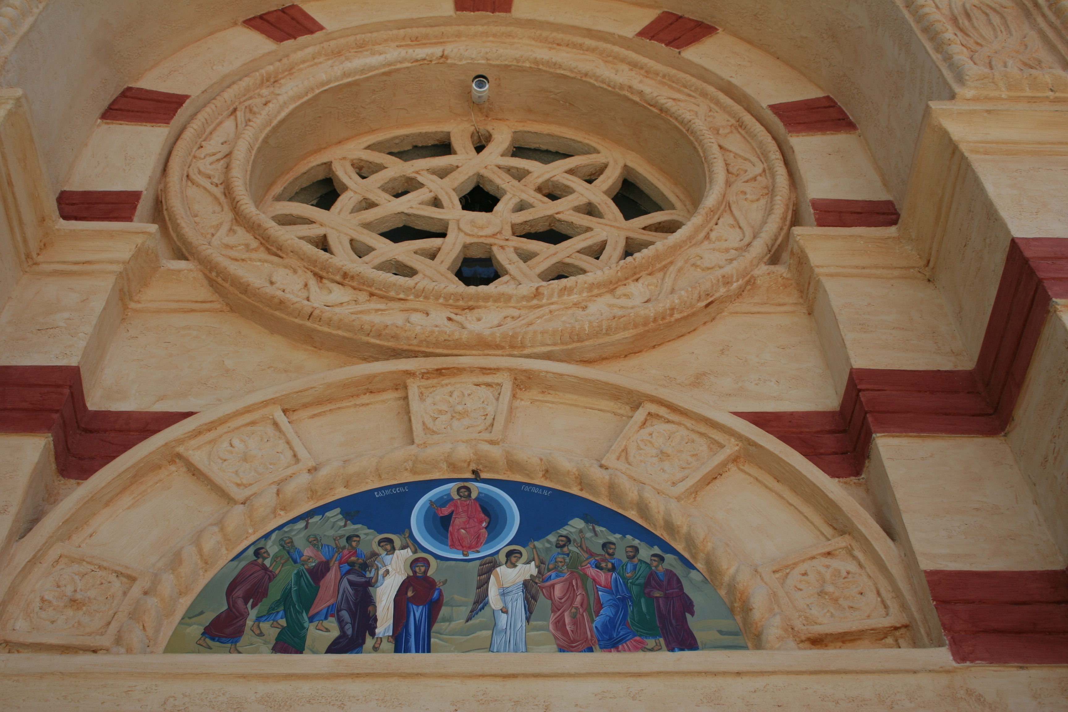 Crkva-spomen kosturnica Vaznesenja Gospodnjeg, Dublje